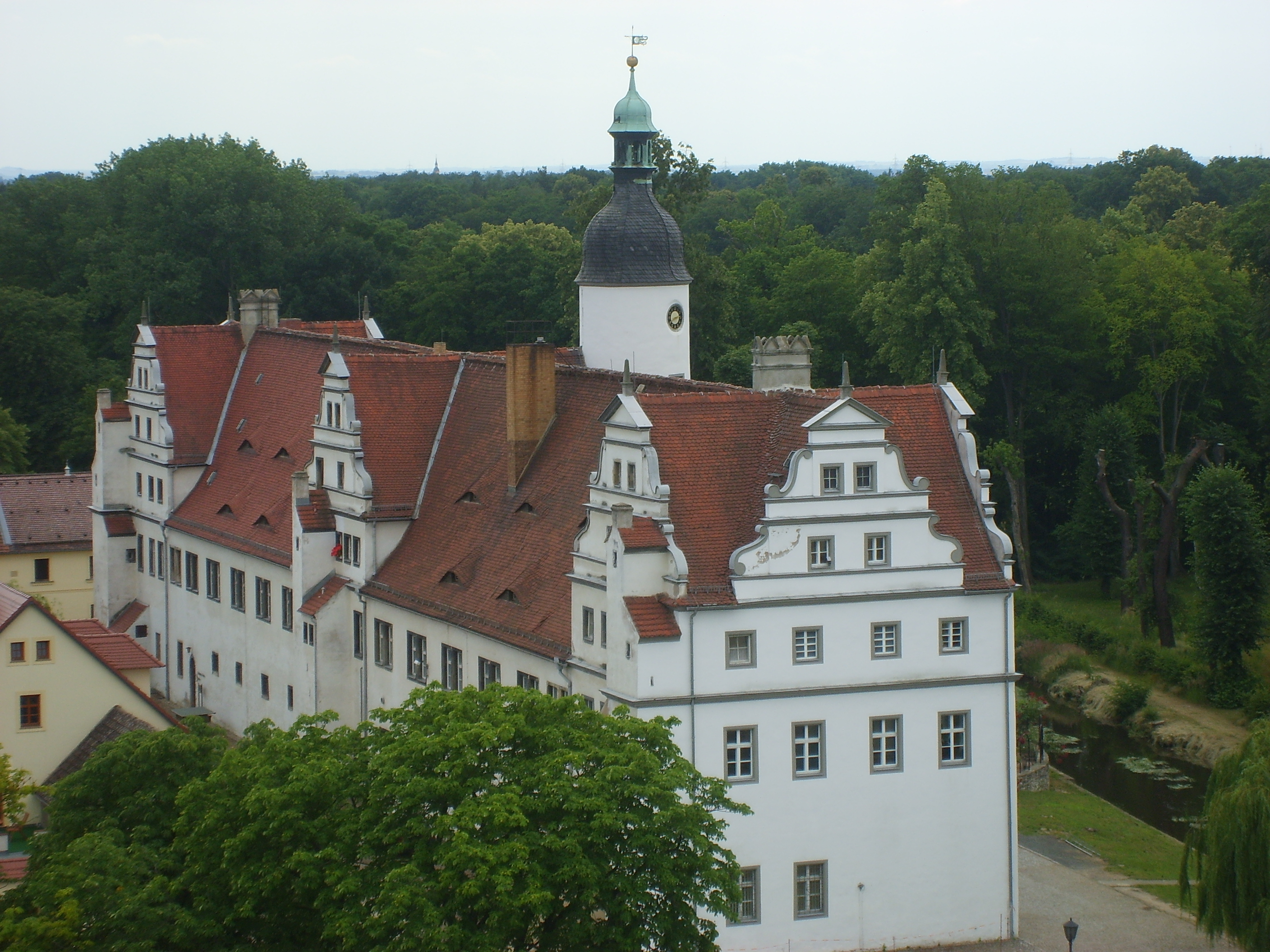 Kurfürstliches Stallgebäude in Zabeltitz, im Volksmund „Altes Schloß“ genannt